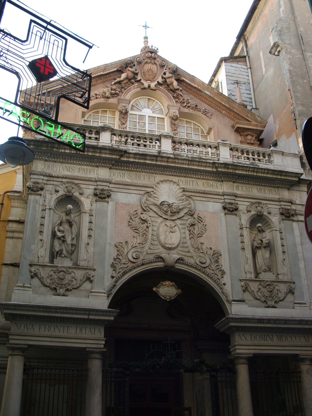 Genova Chiesa di Santa Maria Maddalena